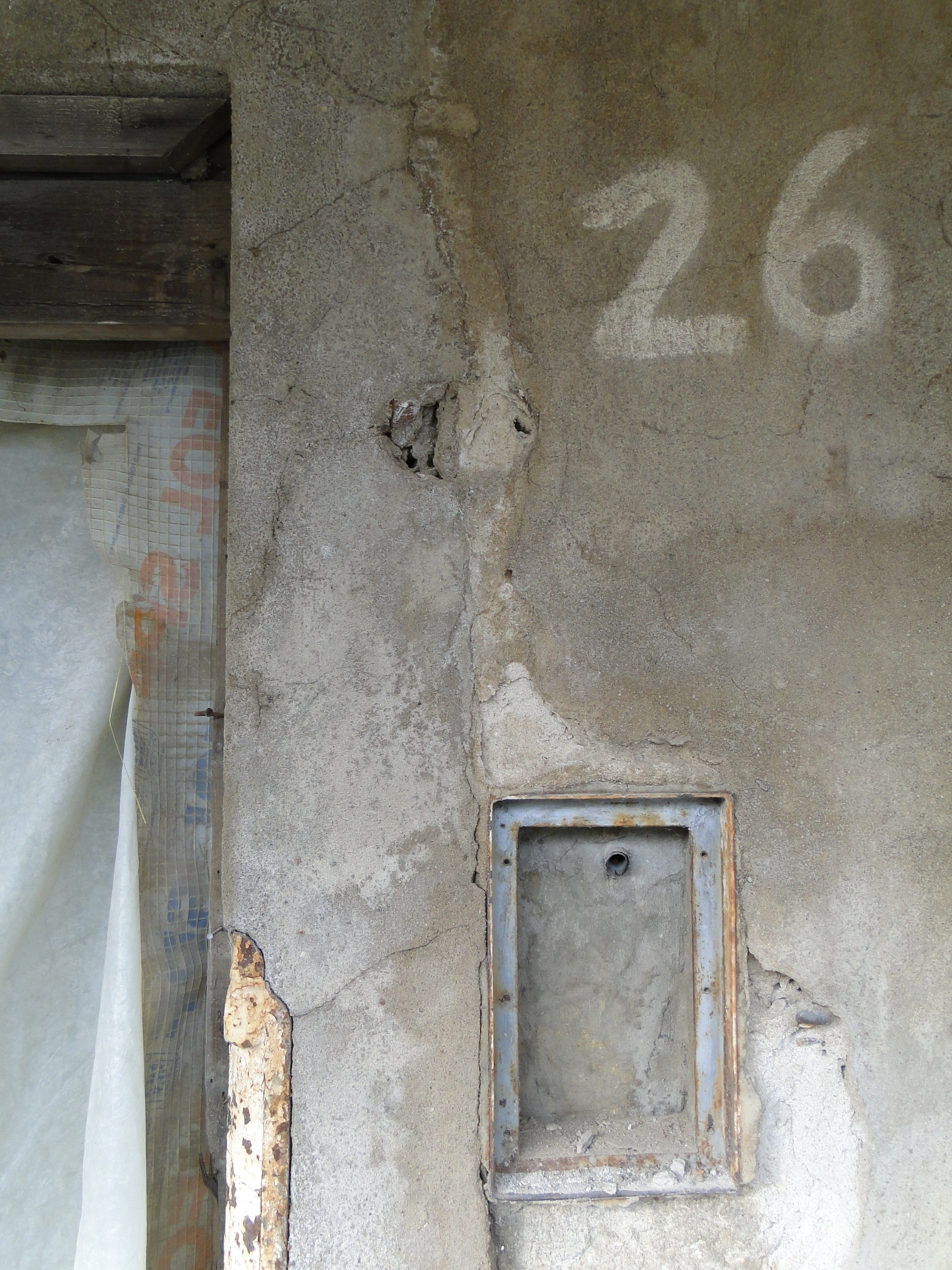 provisorische Hausnummer an der Ruine Friedrichstraße 26, während der Bauarbeiten April 2011